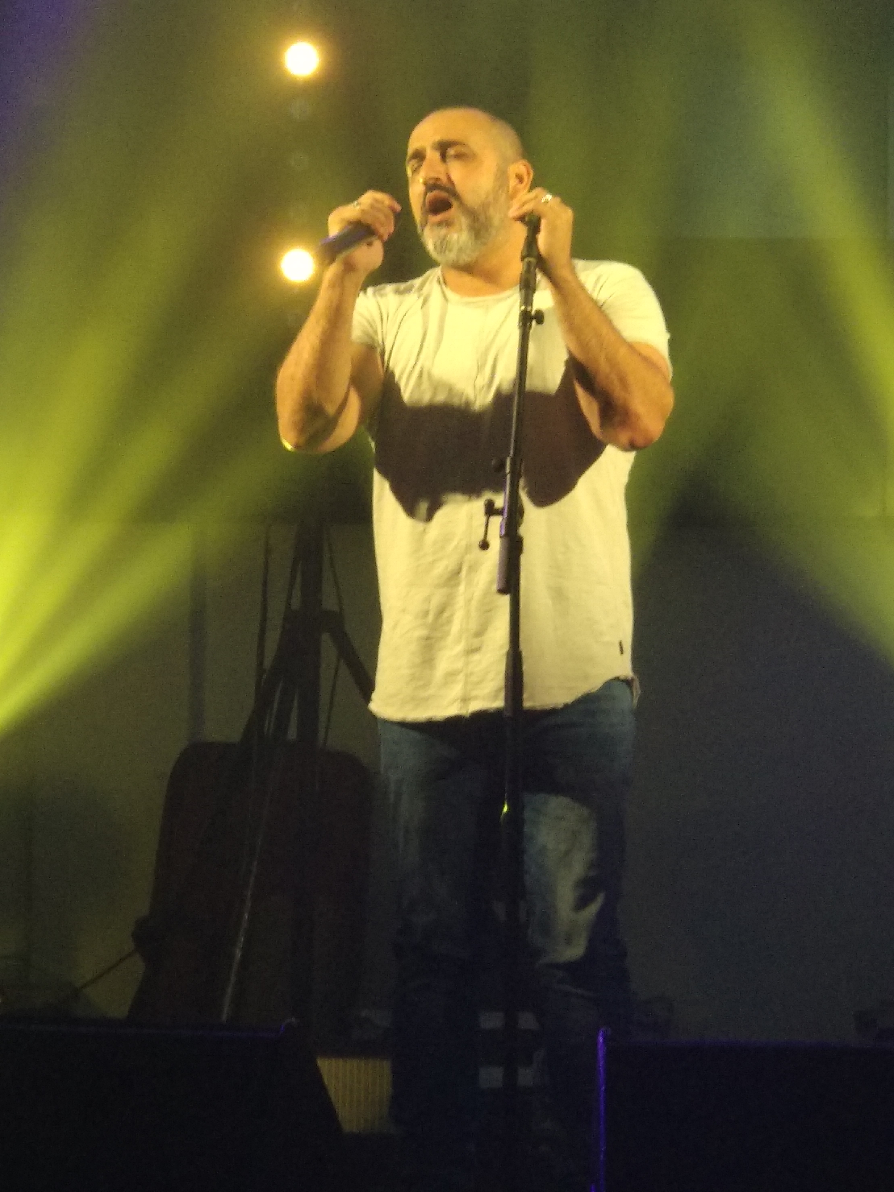 קובי אפללו בהופעה